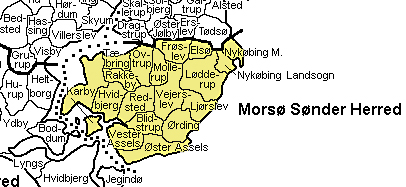 Morsø Sønder Herred, Thisted Amt Denmark Source: Map by Svend-Erik Christiansen